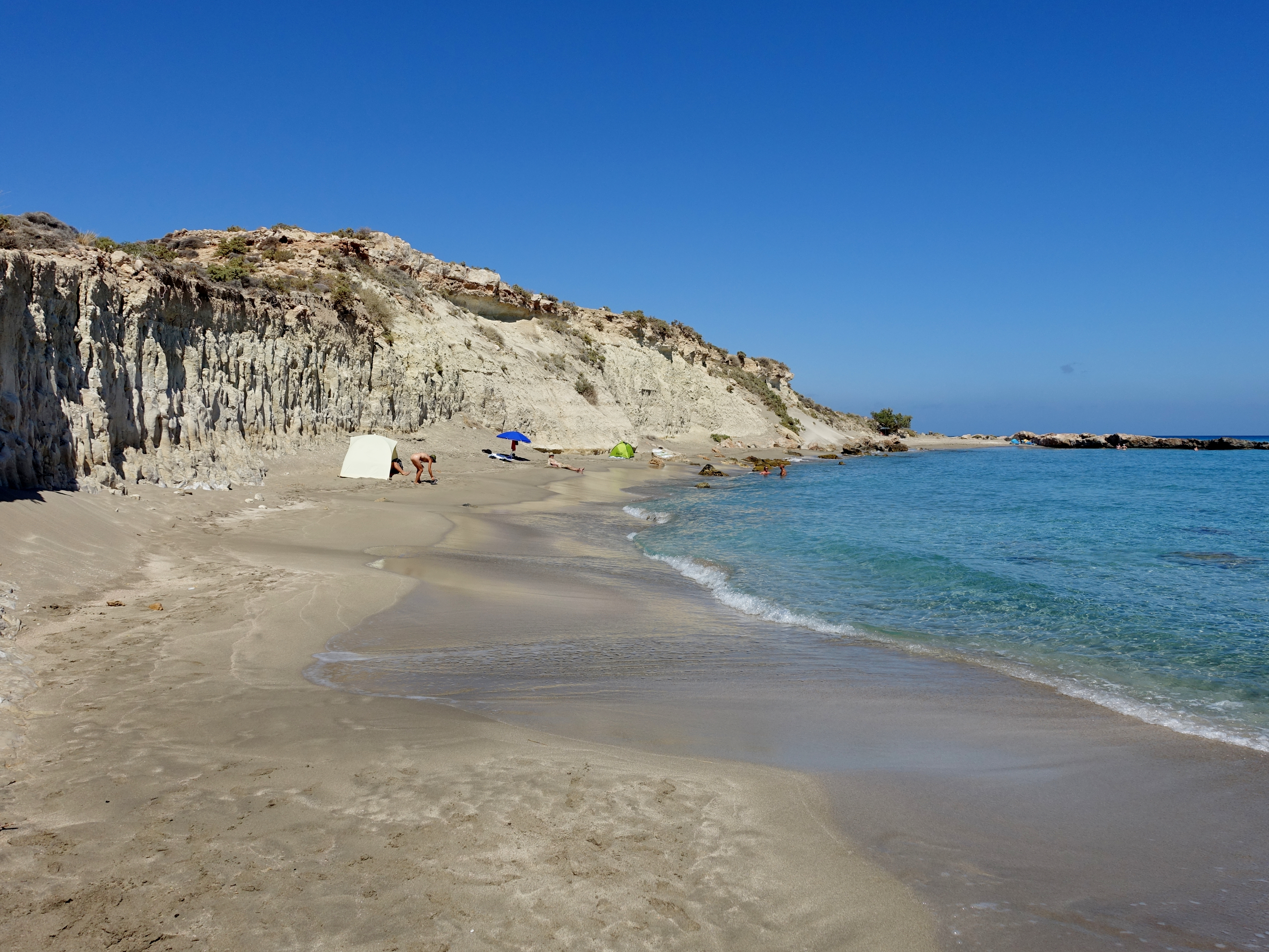 Paralia Argilos (Παραλία Άργιλος ‚Tonstrand‘), Kreidestrand an der Südostküste Kretas bei Xerokambos (Ξερόκαμπος), Gemeinde Sitia, Kreta, Griechenland